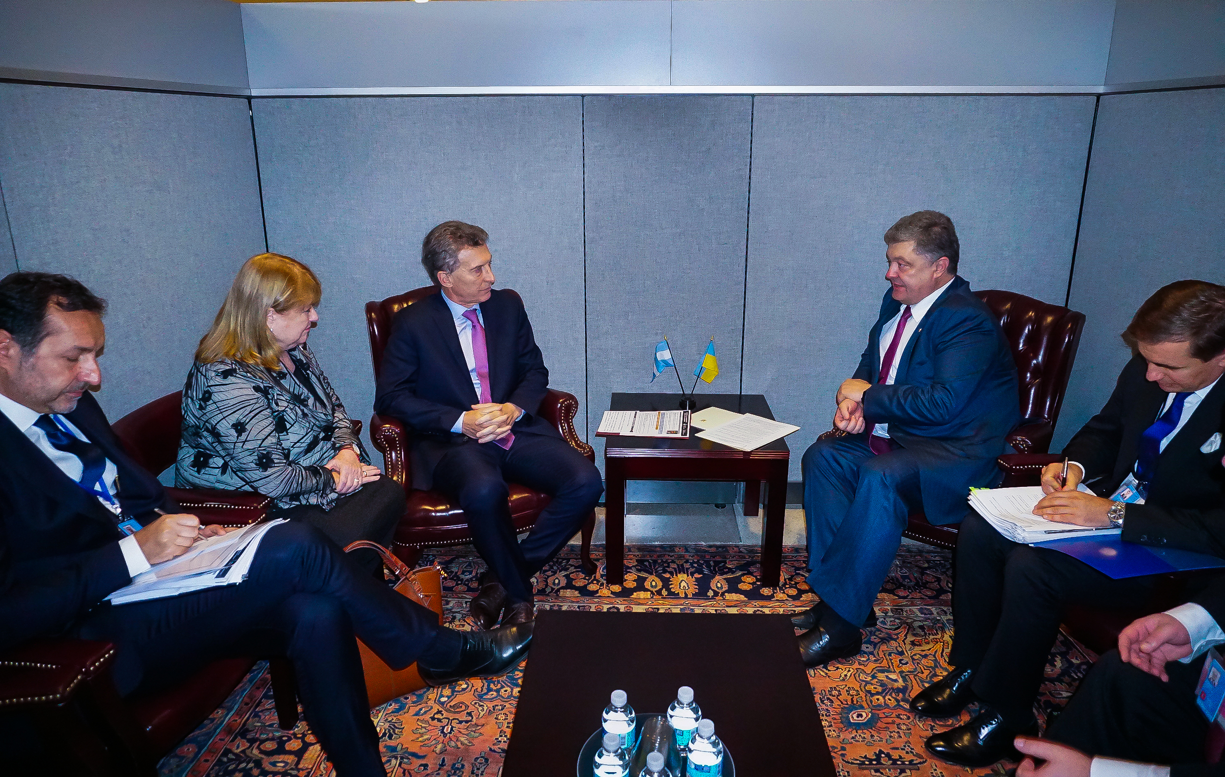 El presidente Mauricio Macri mantuvo una reunión bilateral con su par de Ucrania, Petró Poroshenko, con quien dialogó sobre la posibilidad de trazar un puente de cooperación en materia agrícola, cultural y tecnológica.